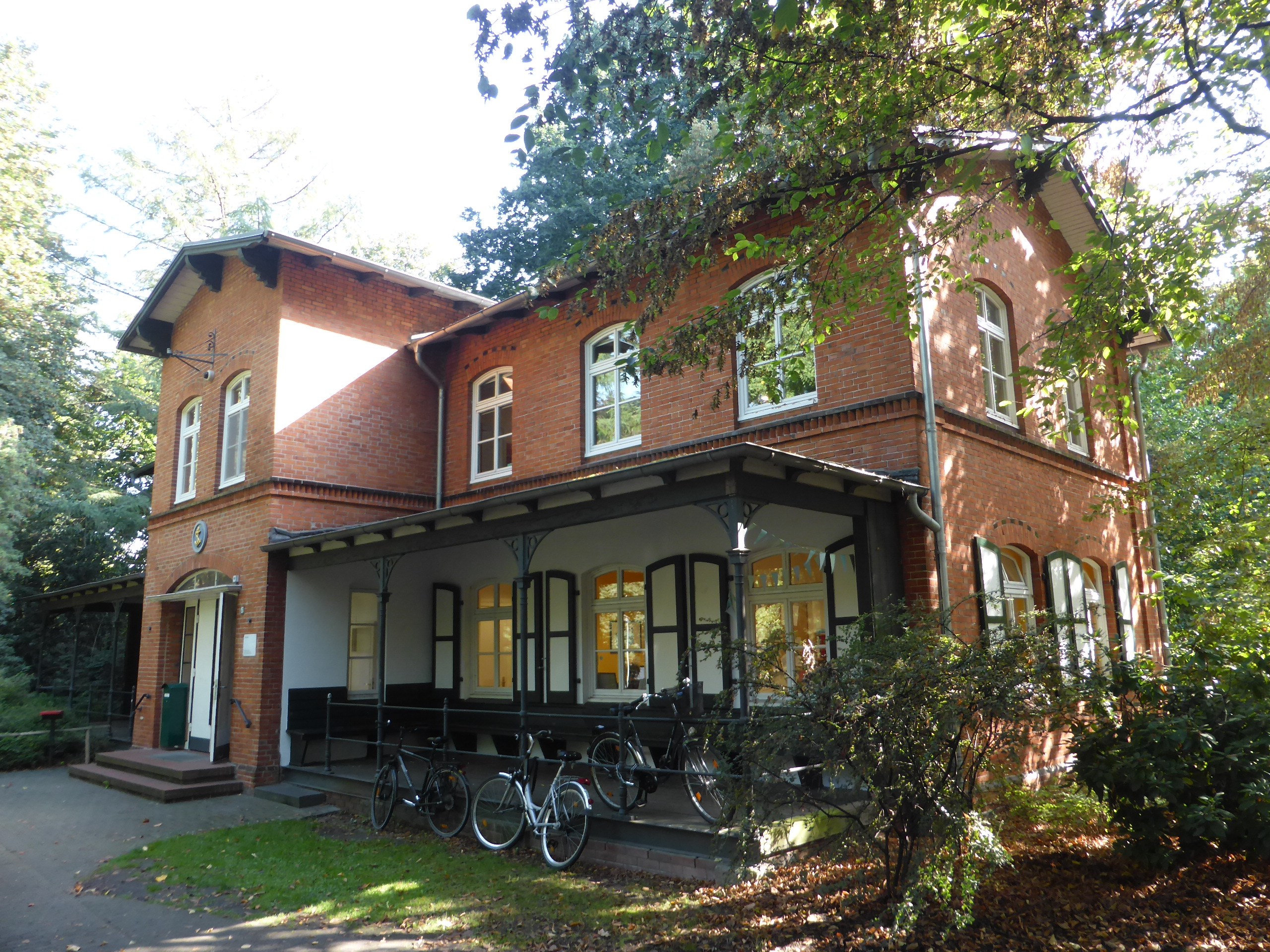 Das Gebäude wurde bei der Bombardierung 1943 nicht zerstört.